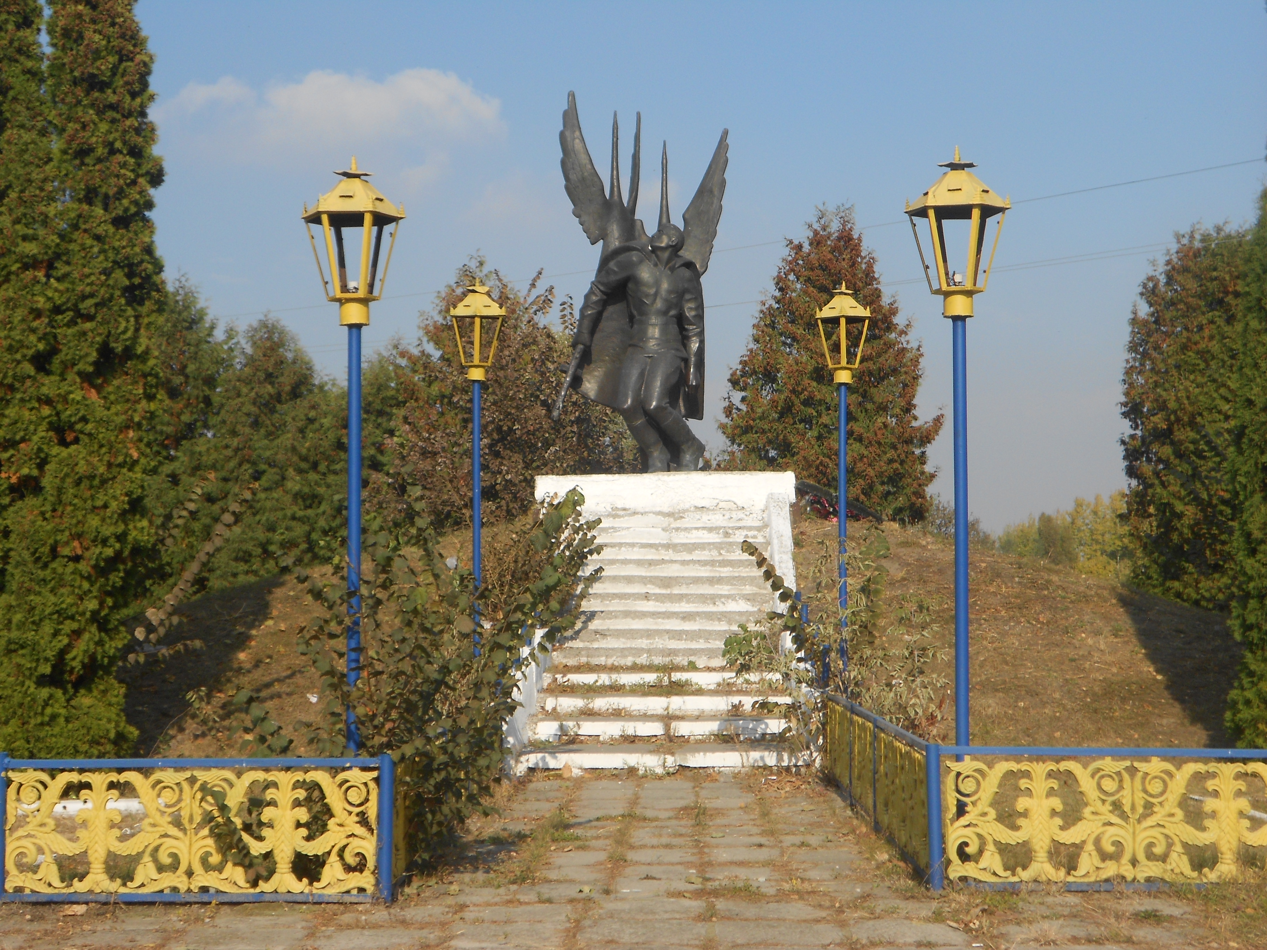 Пам'ятник у Ганнівці